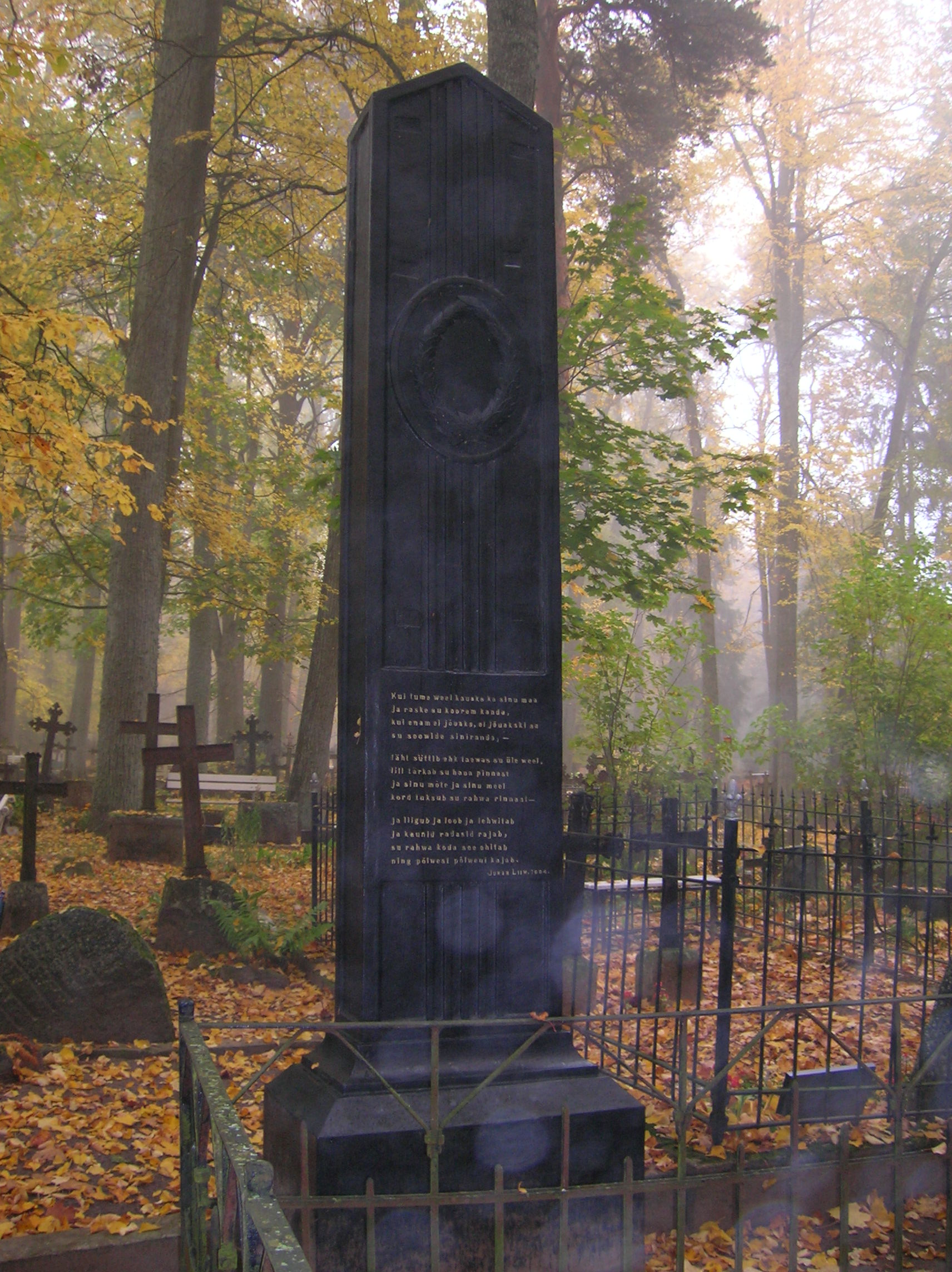 Asub Alatskivi surnuaias. Skulptor Voldemar Mellik (1887–1949)